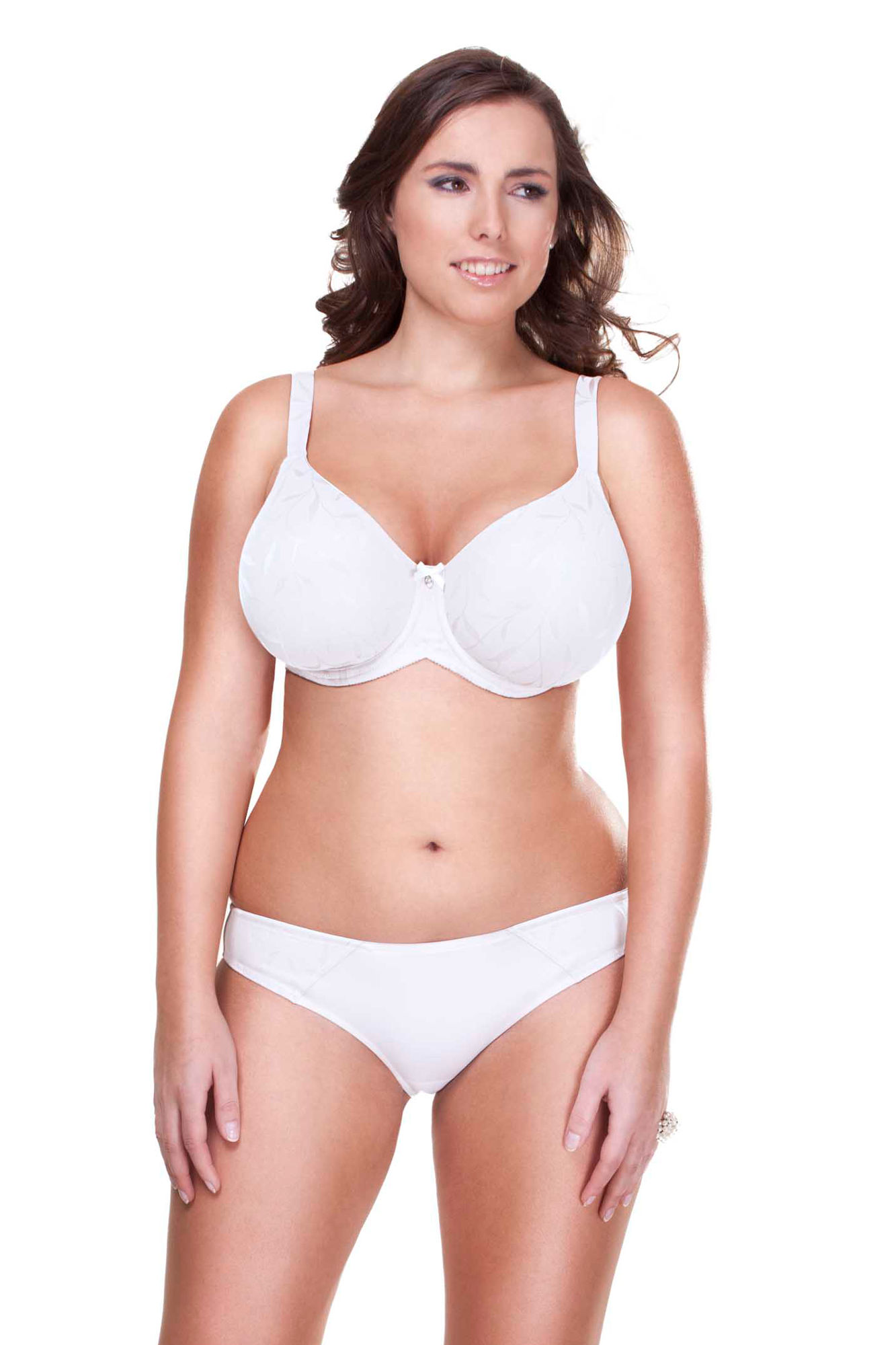 Zmenšovací podprsenka Like YOU má pevné, bezešvé, nevyztužené koše, které jsou vytvarovány z moldovaného (tepelně lisovaného) žakárového úpletu. Model opticky zmenší prsa až o jednu velikost. Nabízí komfortní, měkce obalená ramínka a v koších flexi kostice, které se přizpůsobí tvaru a pohybu prsou.